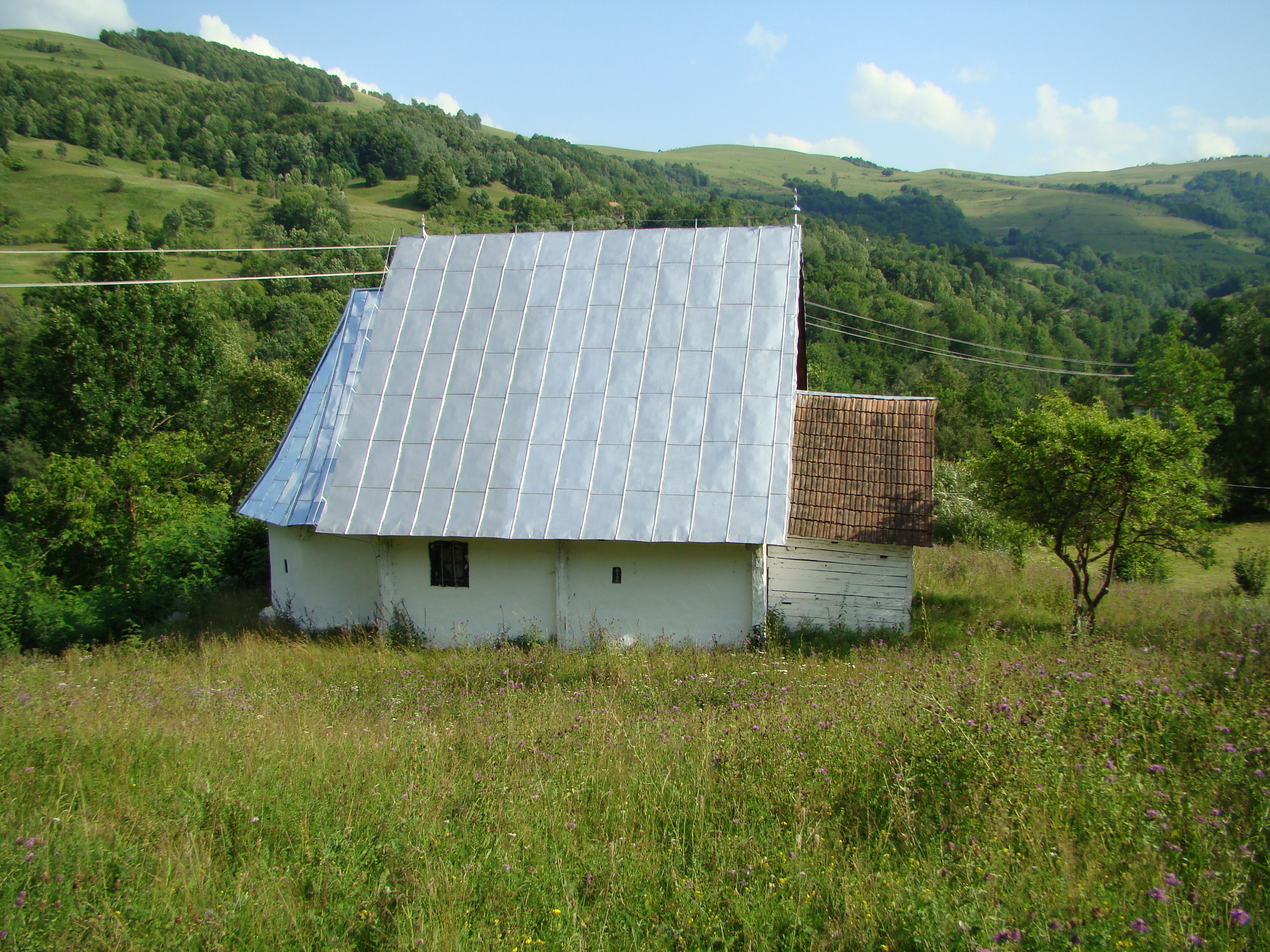 Biserica de lemn din Valea Largă-Alba